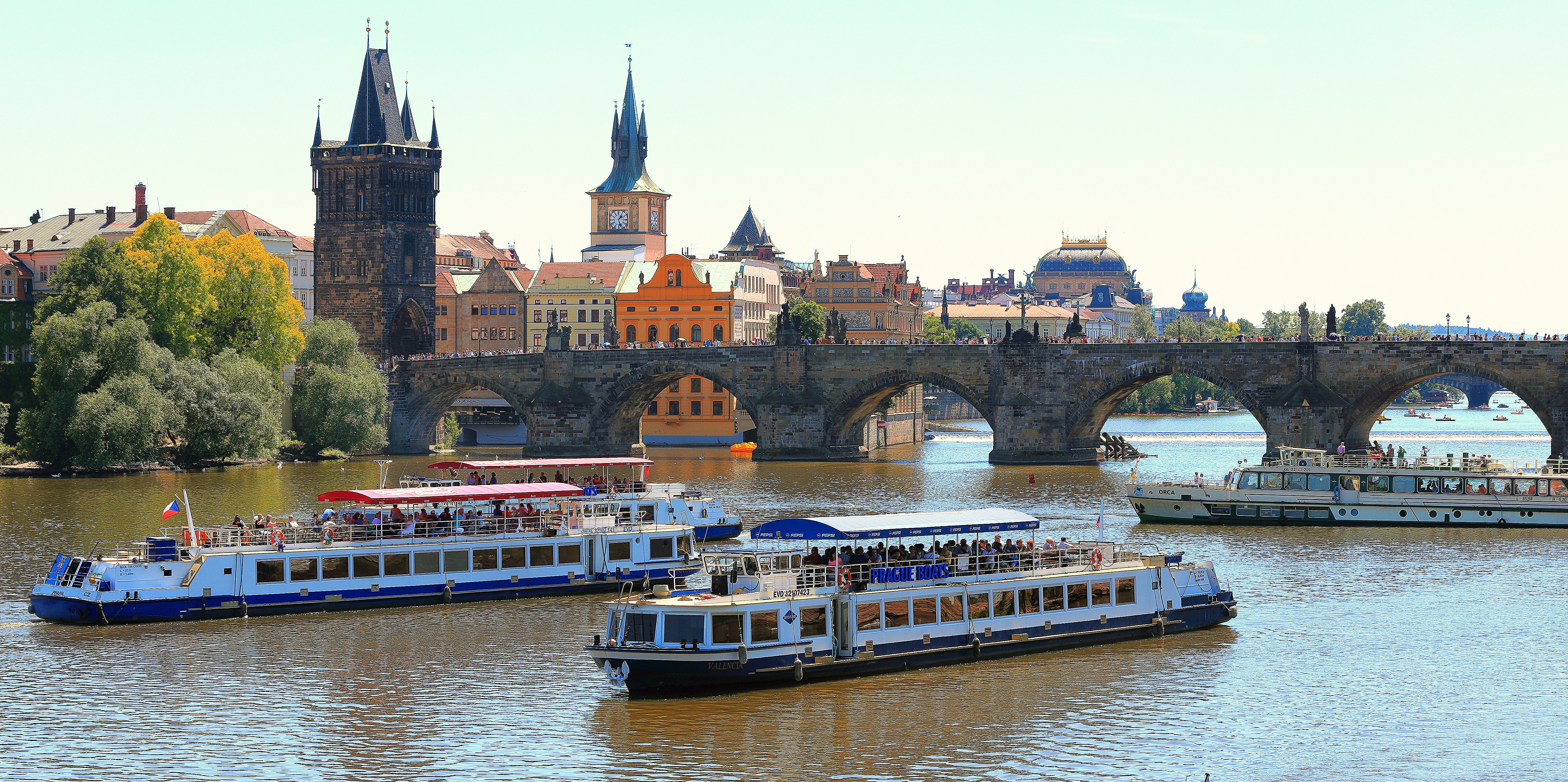 Výletní lodě u Kalova mostu.